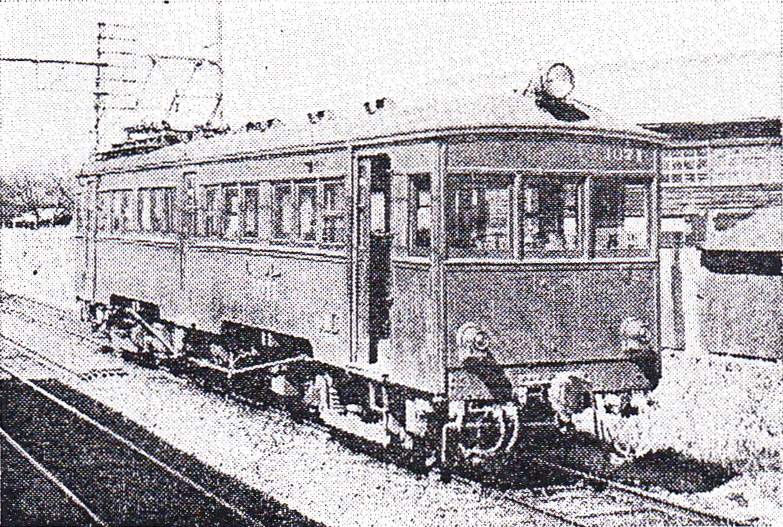 名鉄モ1070形1071。旧・愛知電気鉄道が電6形として1925年導入。須ヶ口駅にて撮影。